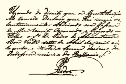 Carta de abdicação de D. Pedro I do Brasil, em 1831.The document says:Usando do direito que a Constituição me concede, declaro que hei muito voluntariamente abdicado na pessoa de meu muito amado e prezado filho o Senhor D. Pedro de Alcântara.Boa Vista, sete de abril de mil oitocentos e trinta e um, décimo da Independência e do Império.Pedro